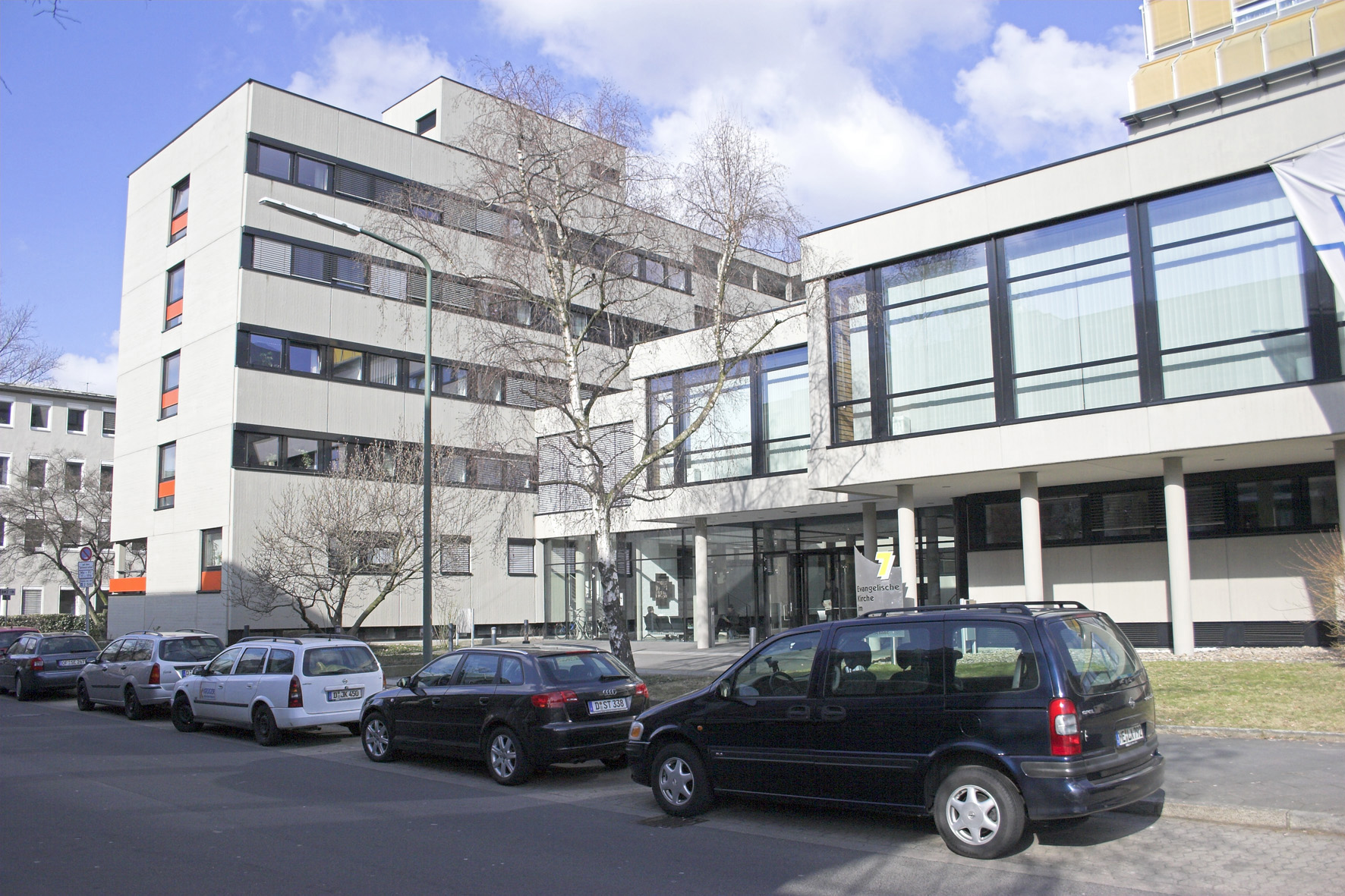 Das Landeskirchenamt der EKiR in Düsseldorf, Sitz des Archivs der Evangelischen Kirche im Rheinland, Hans-Böcker-Straße 7, Düsseldorf-Golzheim